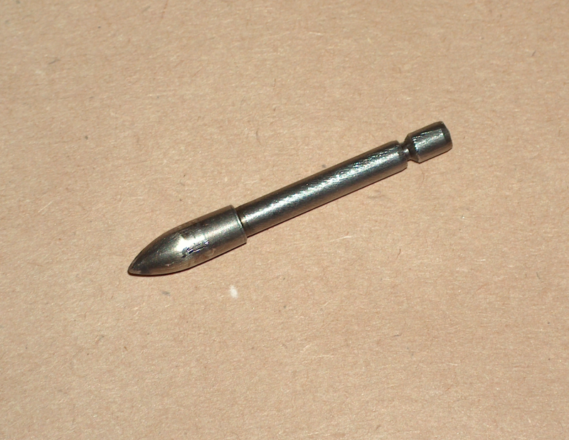 Grot do strzały A/C/E